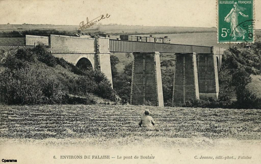 Pont de bouler - viaduc de Rapilly.